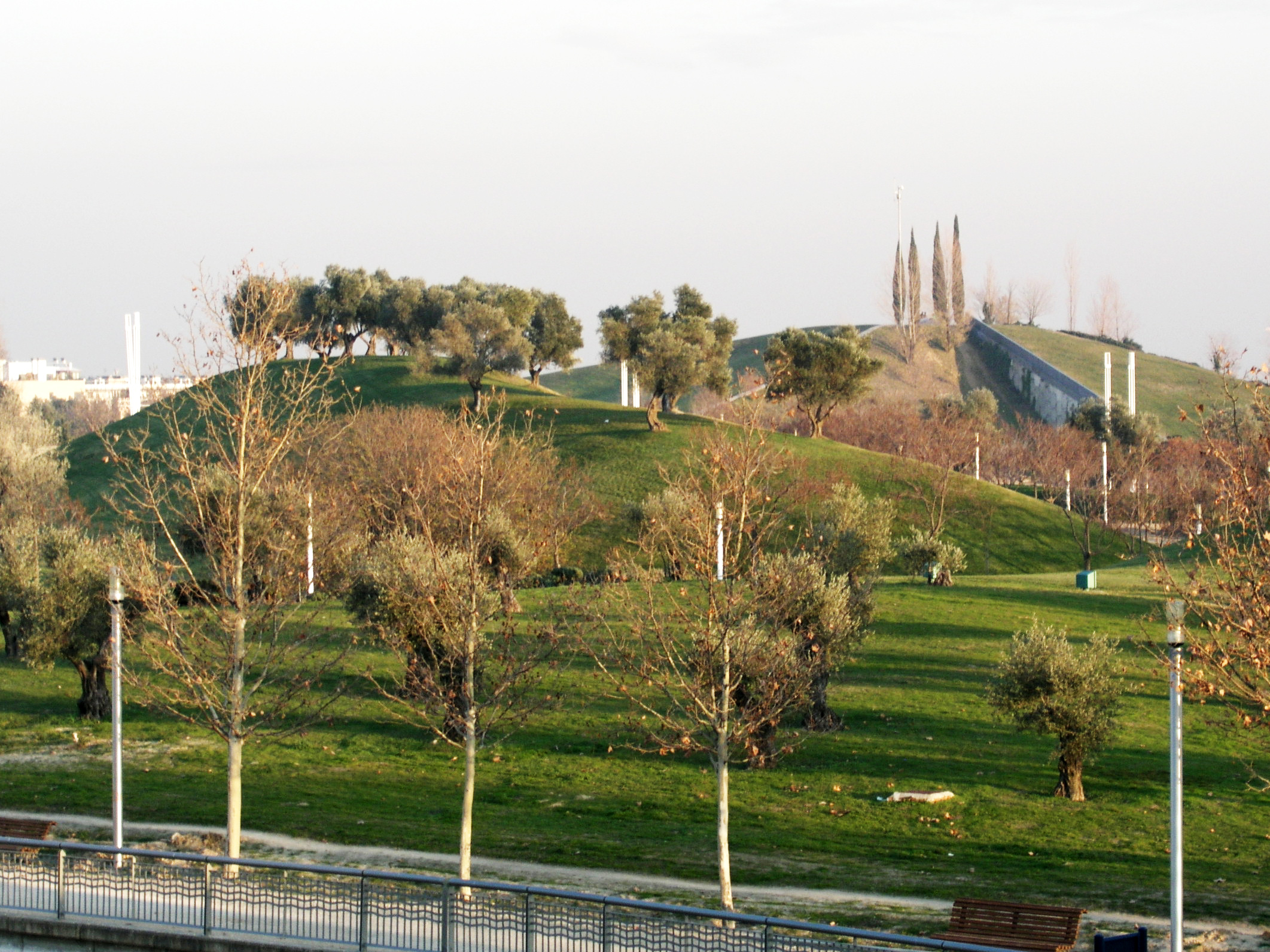 Parque Juan Carlos I, Madrid, Spain.